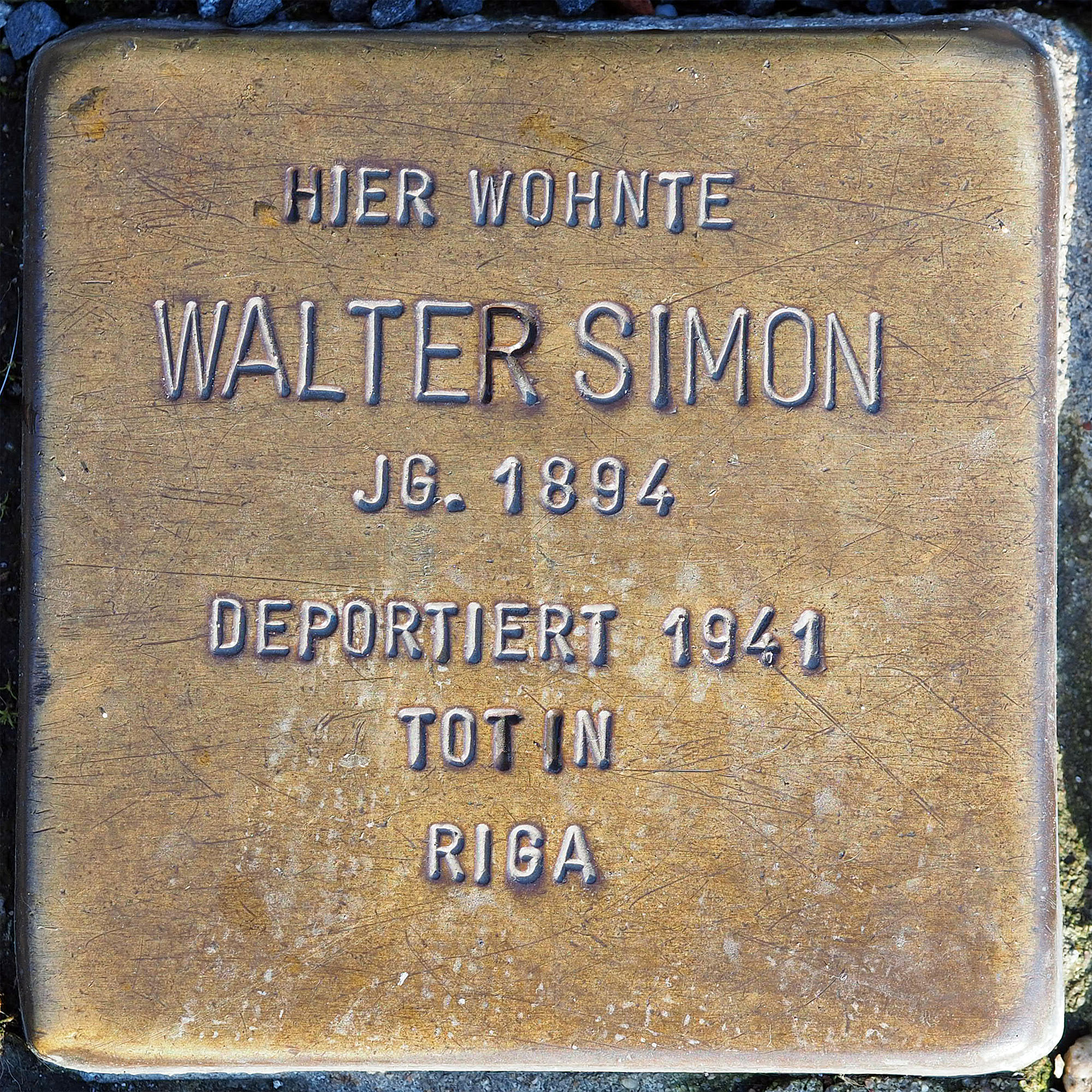 Stolpersteine MG: Simon, Walter